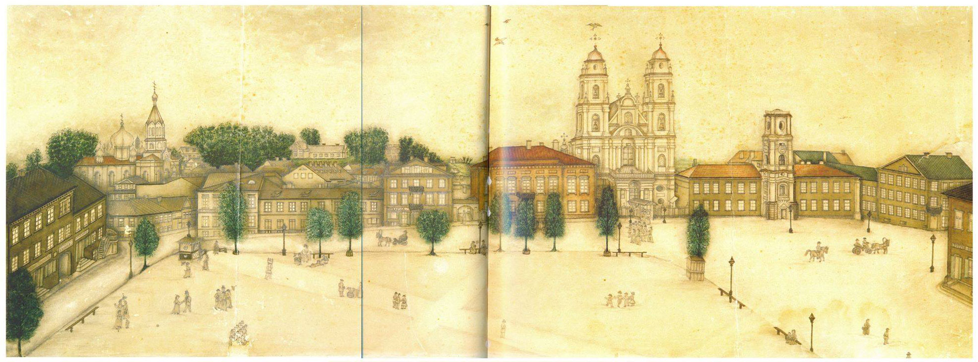 Беларуская (тарашкевіца): Менск (Miensk), пляц Высокі Рынак (plac Vycoki Rynak)